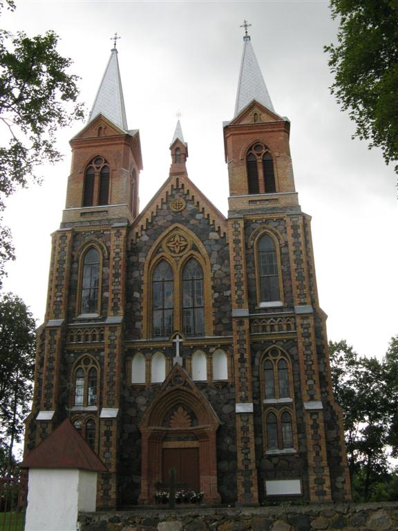 Čedasų Šv. apaštalų Petro ir Povilo bažnyčia